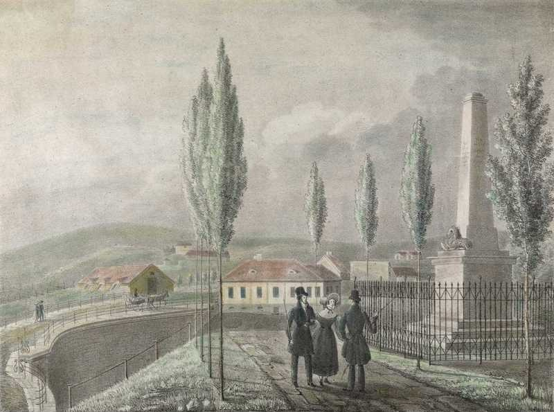 Krohgstøtten